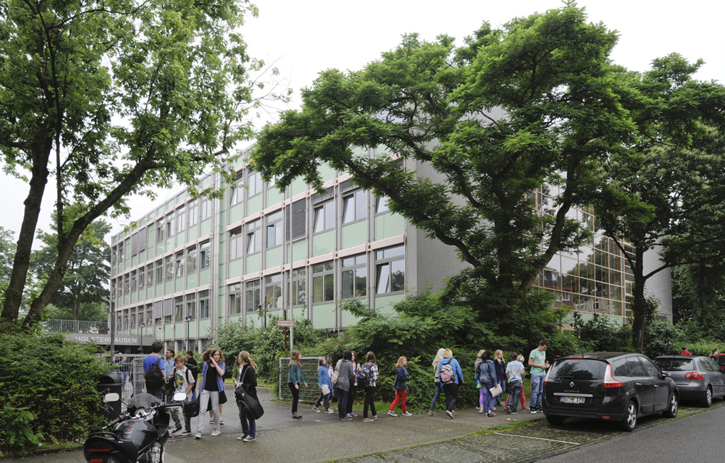 Schüler fragen - der Klimaschutzminister antwortet Die Essener Gesamtschule Holsterhausen wurde im Juli 2012 von Johannes Remmel, Minister für Klimaschutz, Umwelt, Landwirtschaft, Natur- und Verbraucherschutz des Landes Nordrhein-Westfalen und dem Geschäftsführer der EnergieAgentur.NRW, Frank-Michael Baumann, zur EnergieSchule.NRW ausgezeichnet. Flickr tags: Aktion; Essen; Gesamtschule Holsterhausen; EnergieAgentur.NRW; Klimaschutz; Schüler fragen; Schüler; KlimaSchule; 2012; Johannes Remmel; Frank-Michael Baumann